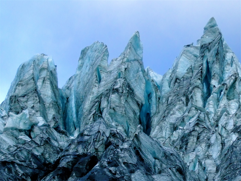 Fox Glacier